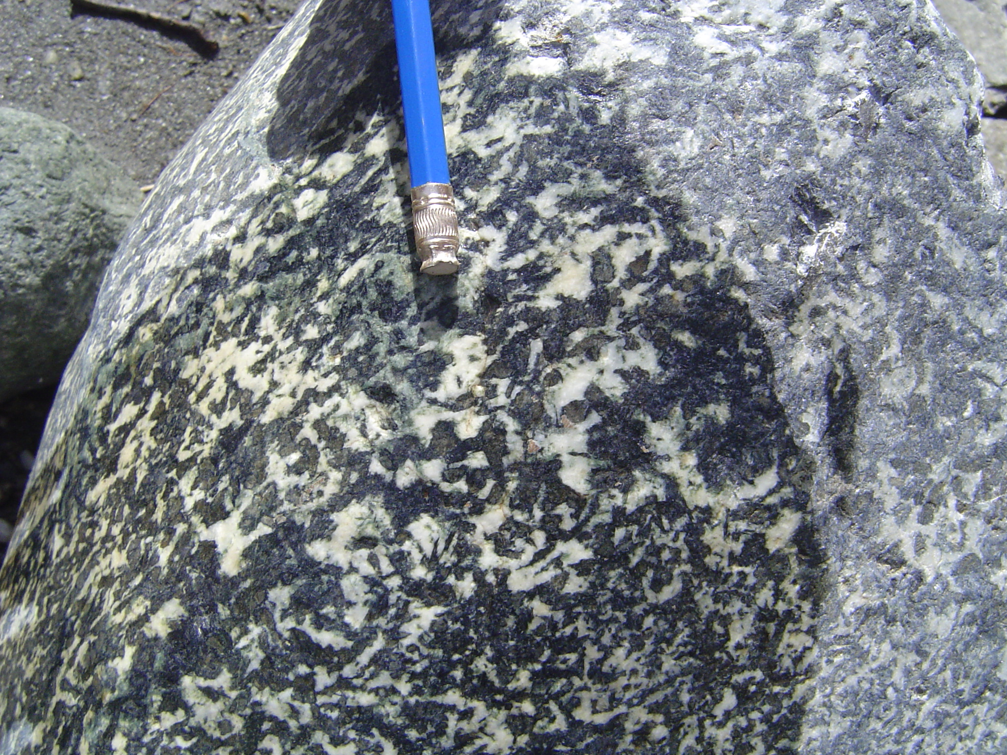 Méta gabbro, glaucophane en couronne autour des clinopyroxènes magmatiques, avec en plus jadéite, minéraux verts....